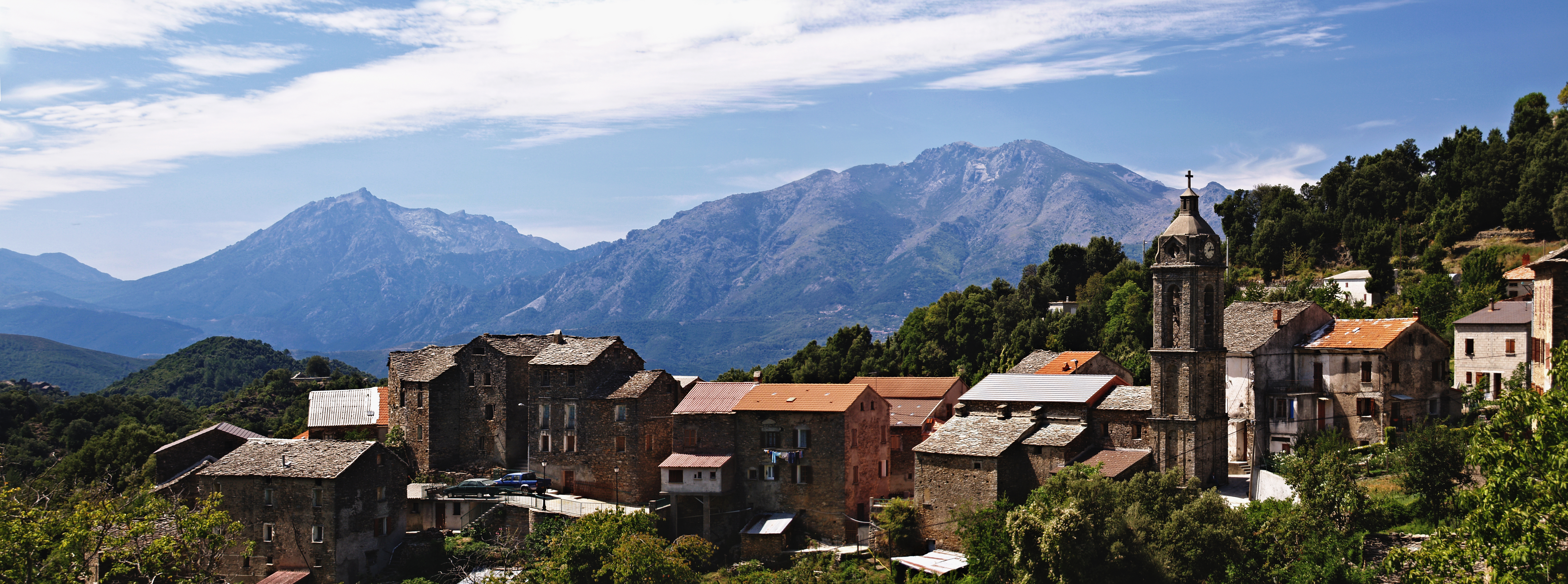 Bustanico (Corsica) - Panorama du village avec au loin Monte d'Oru (2 389 m à gauche) et Monte Cardu (2 453 m à droite)